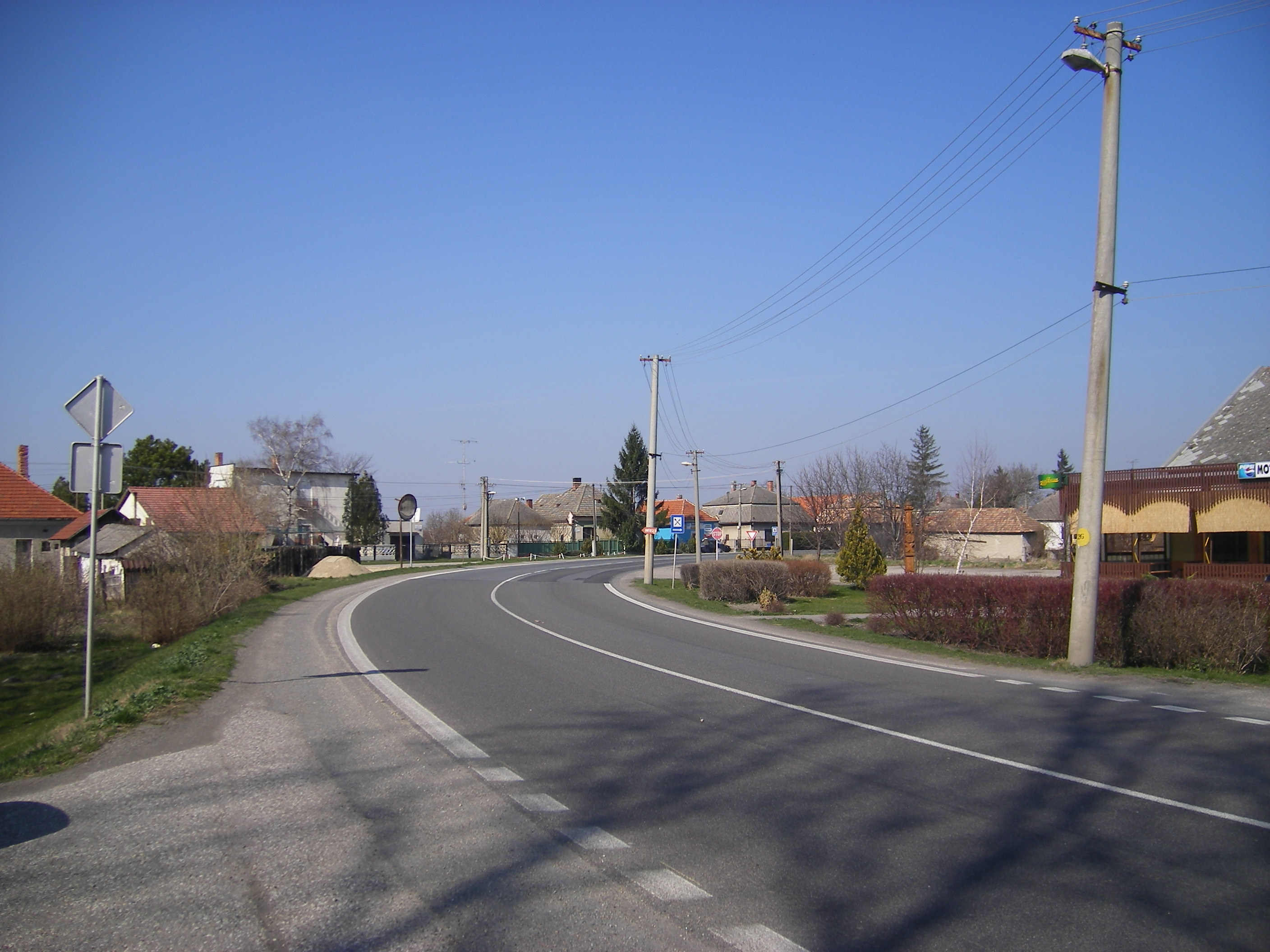 Tanyi utcakép (téves fájlnév)